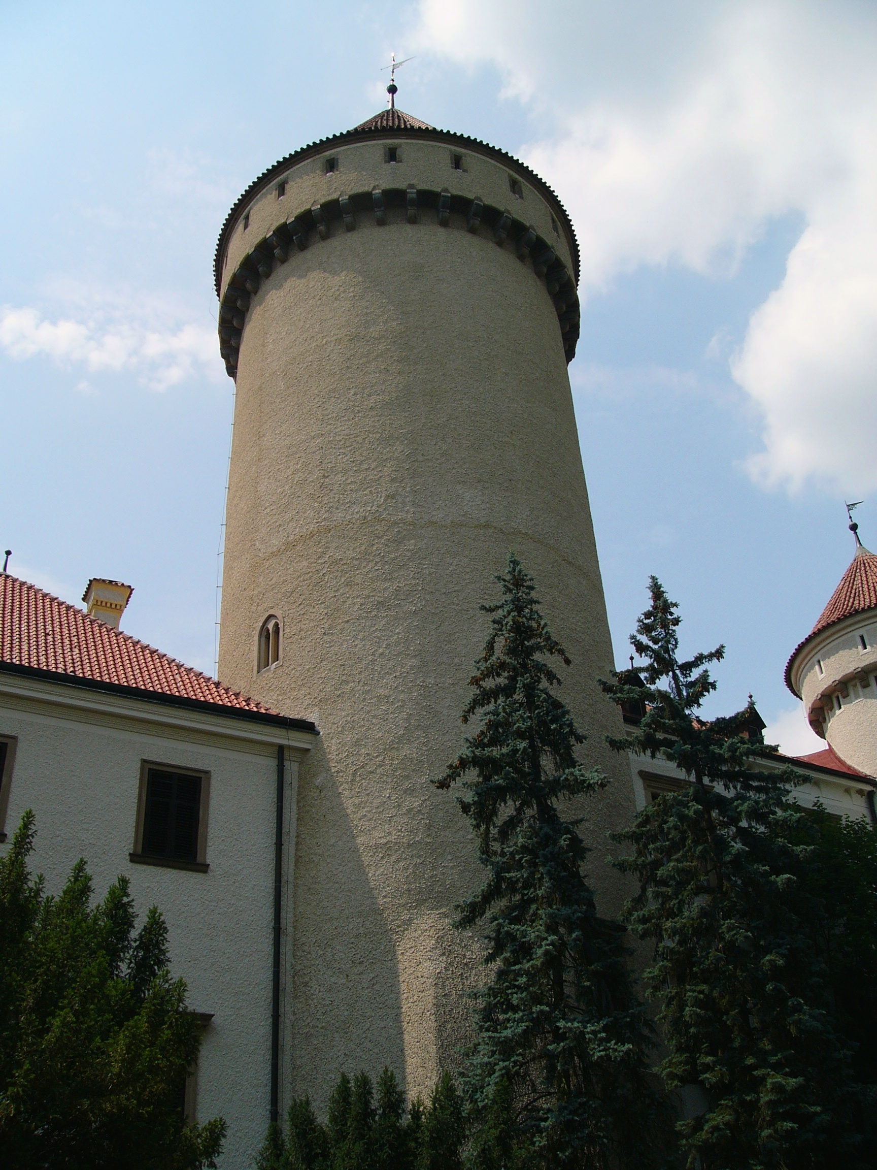 Hlavní věž původního hradu ve středu východního křídla